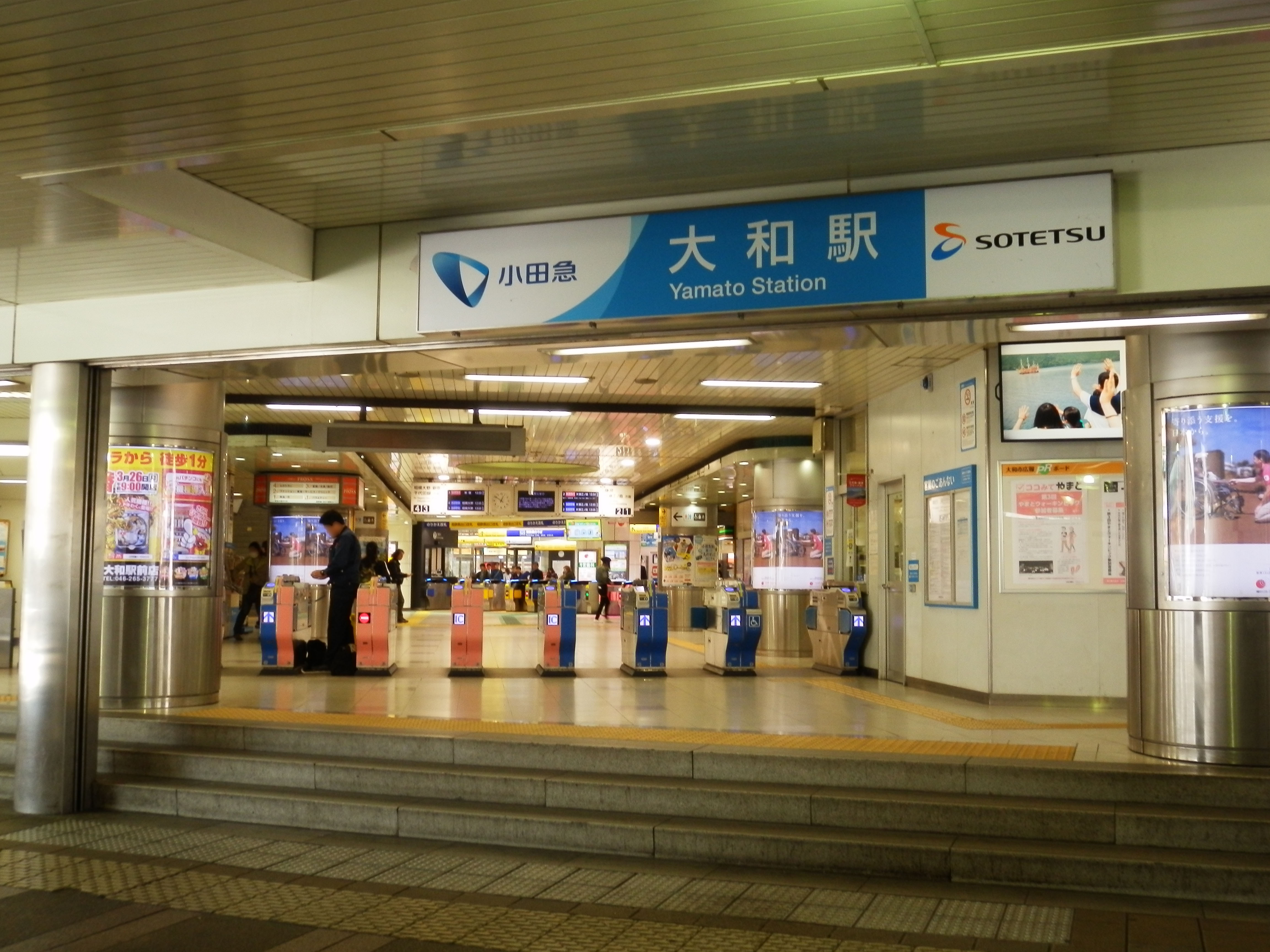 大和駅小田急口（サイン更新後）